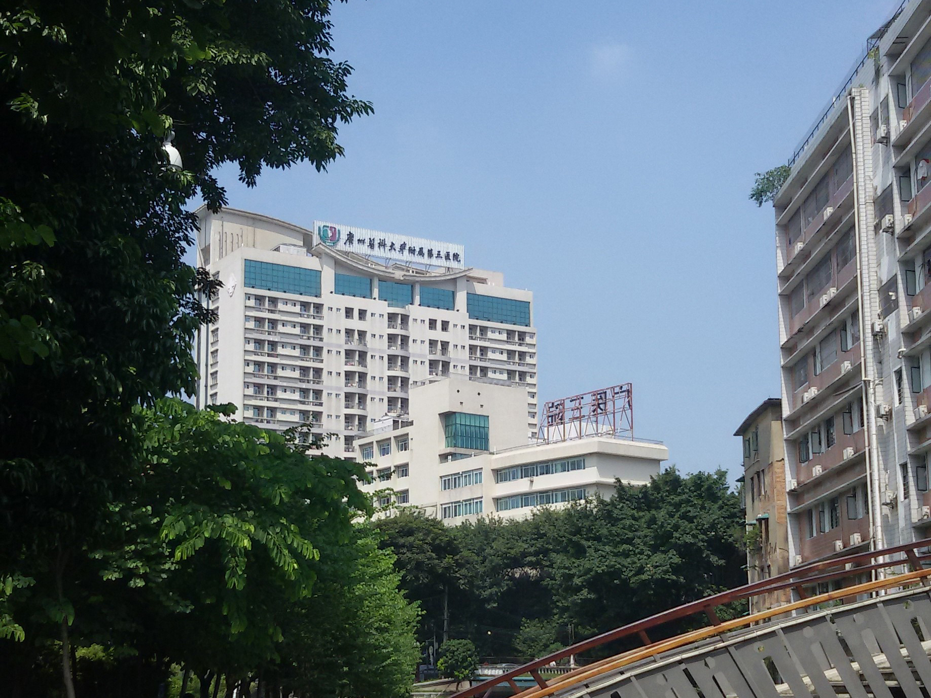 粵語: 廣州醫科大學附属第三医院